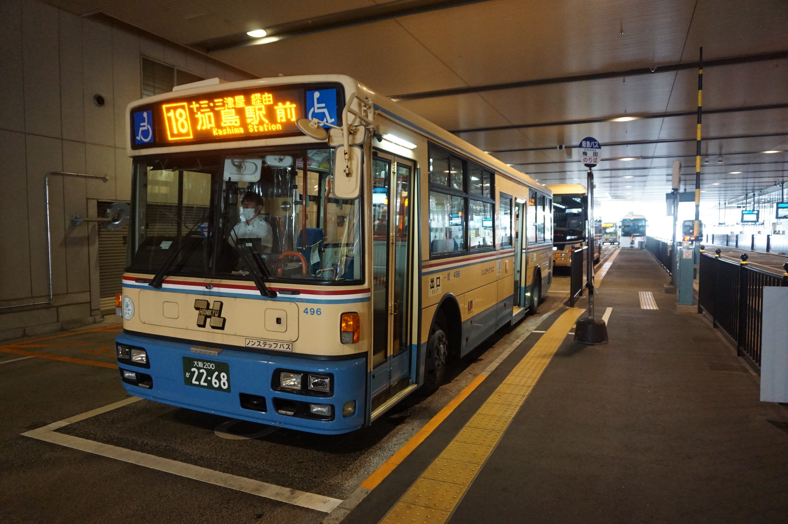 2020年7月に廃止 Sony ILCE-6000